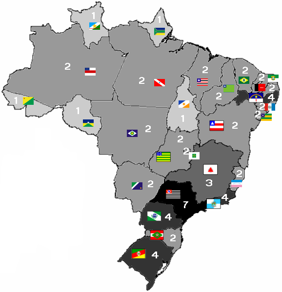 Mapa dos participantes da Copa do Brasil de 2008